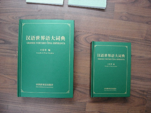 Nove eldonita Granda Vortaro Ĉina-Esperanta. Kompilita de Wang Chongfang.